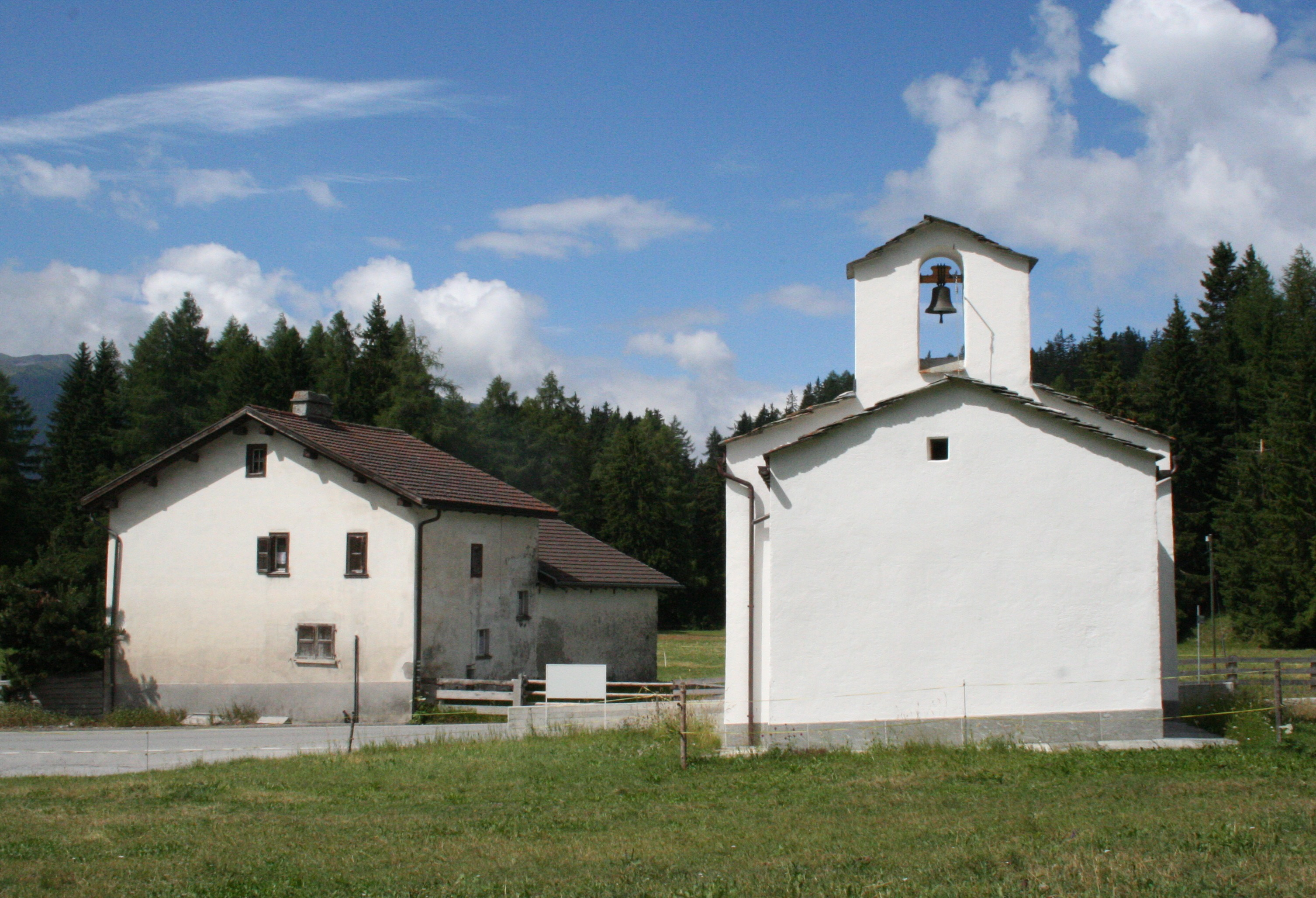 Kapelle St. Cassian Lantsch/Lenz